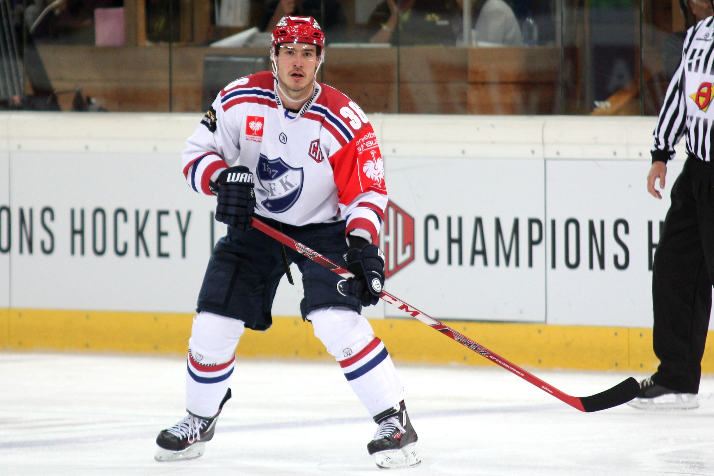 Joonas Järvinen (H 36).